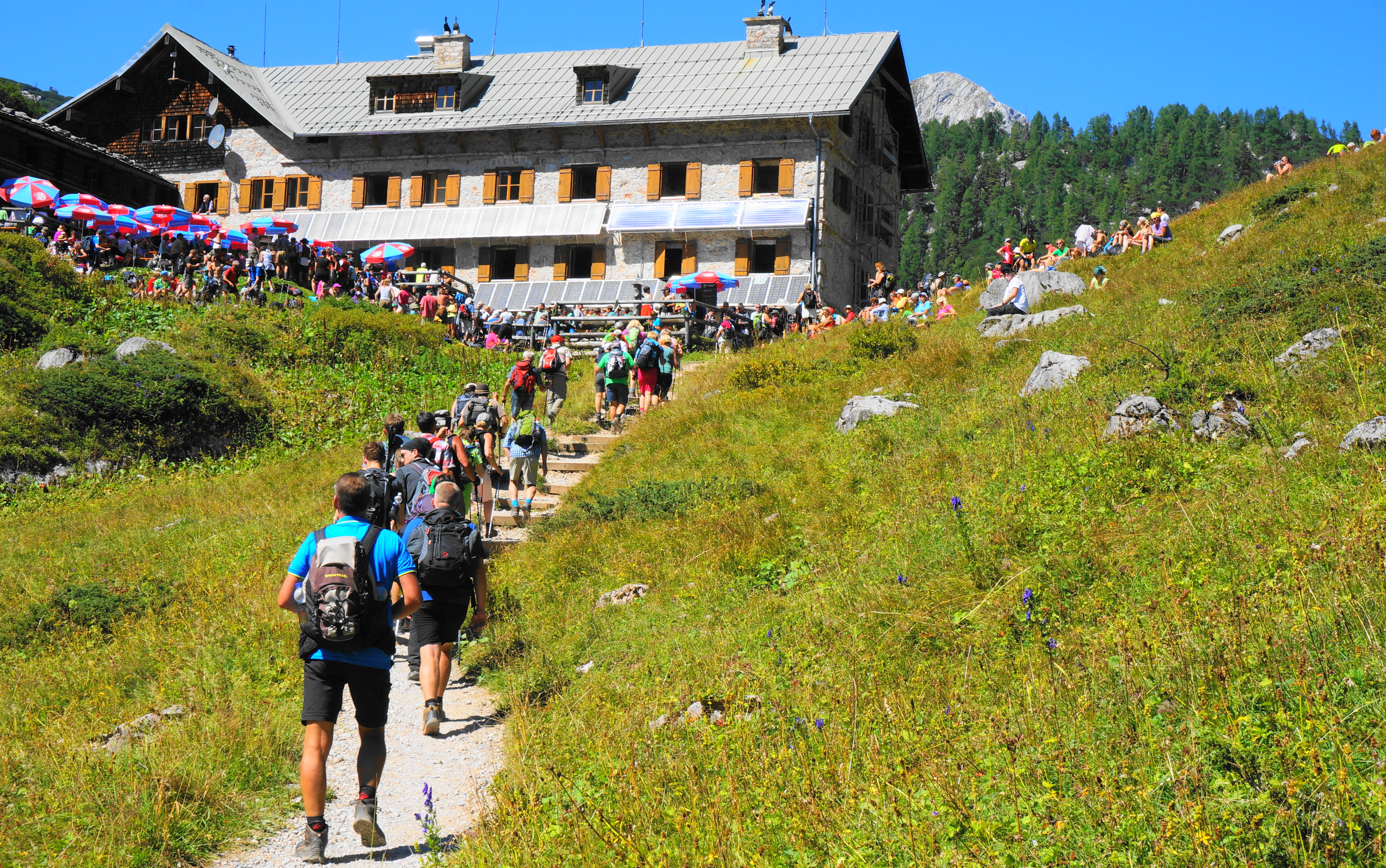 Pilgerweg